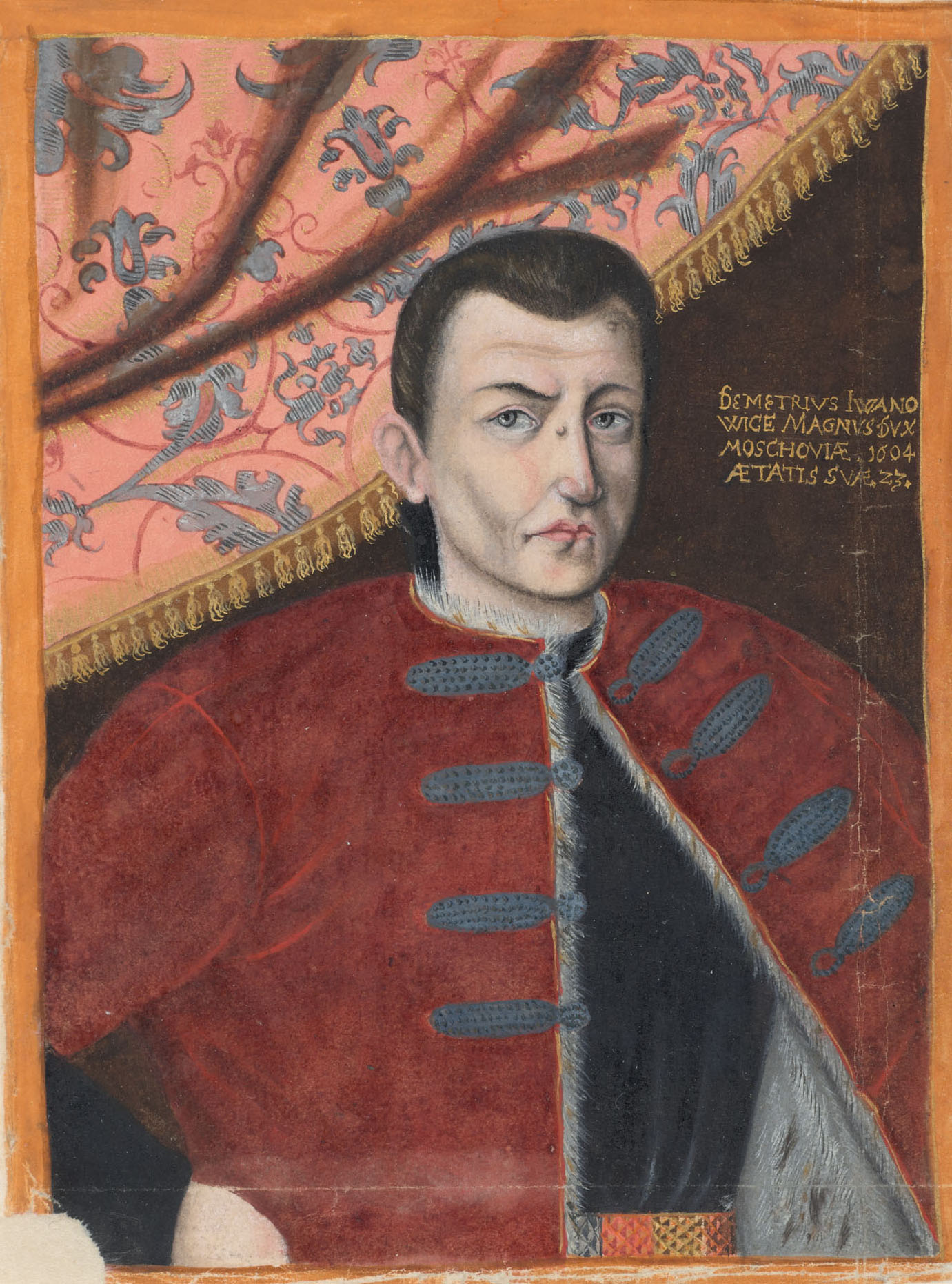 Falscher Demetrius. Aquarell nach einem von dem Gesandten mitgebrachten Bildnis, Oktober 1604 im Thesaurus picturarum Bd. 5 Bl. 233r